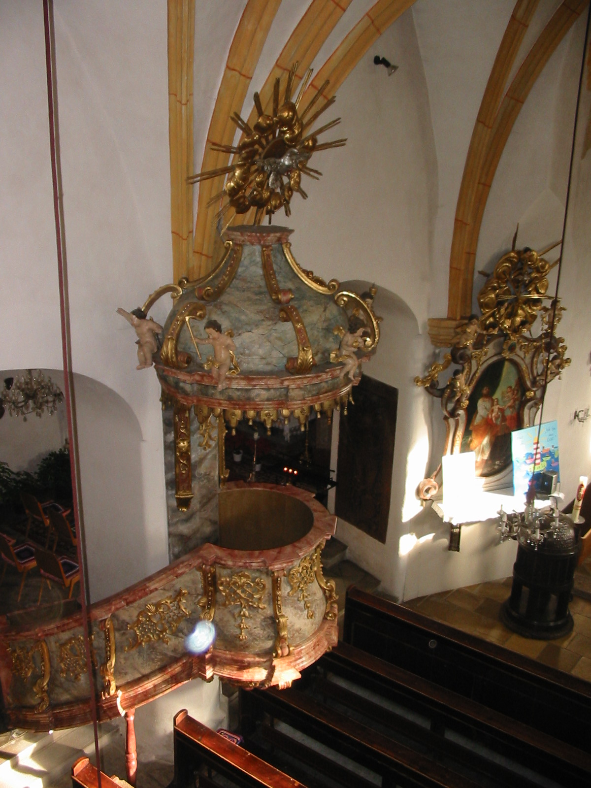 Kanzel der Pfarrkirche Pottschach